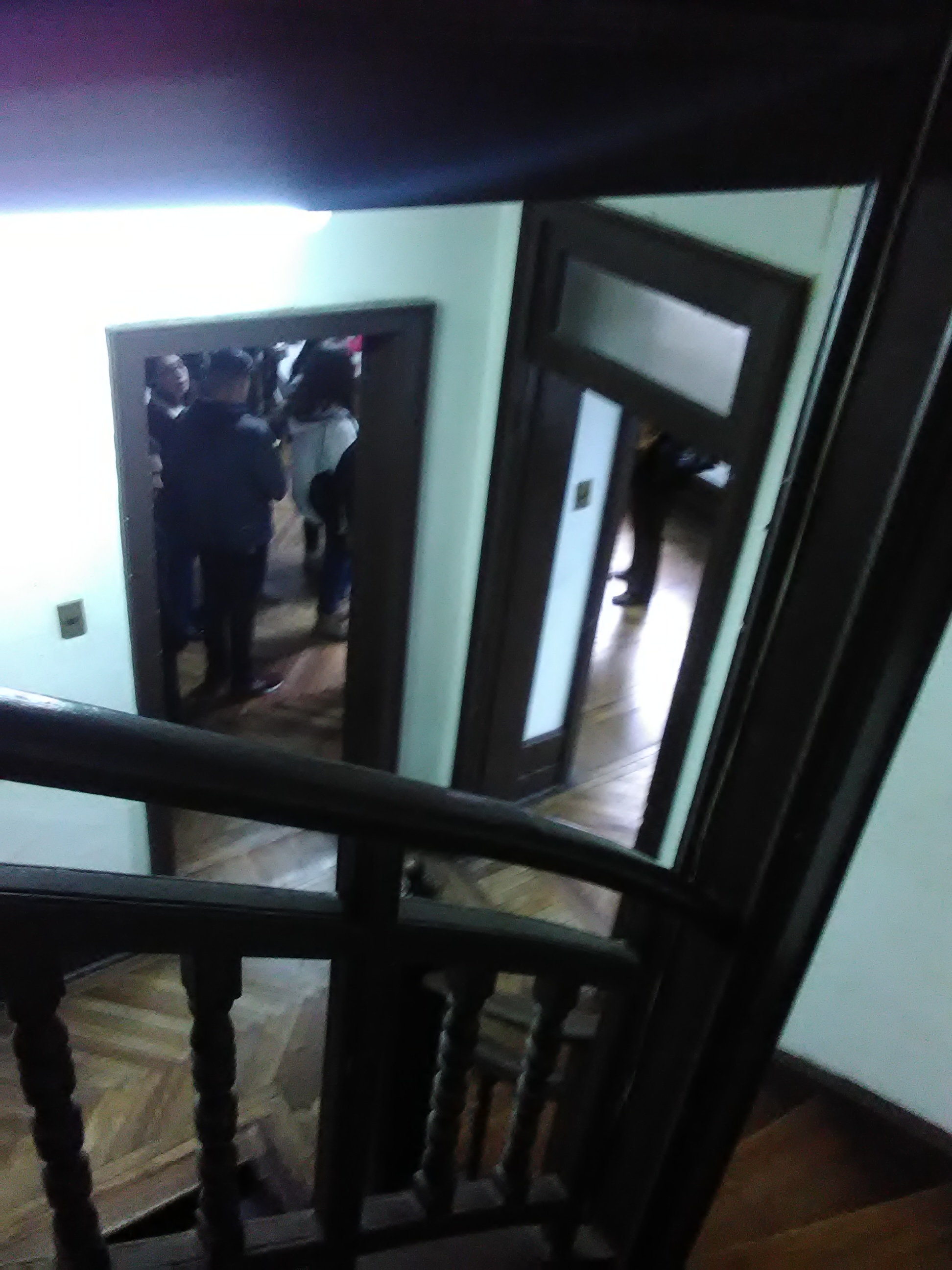 Ubicado en Santiago de Chile, frente al cerro del mismo nombre, fue usado como lugar de torturas y de desaparición de personas durante los primeros años del Régimen Militar.